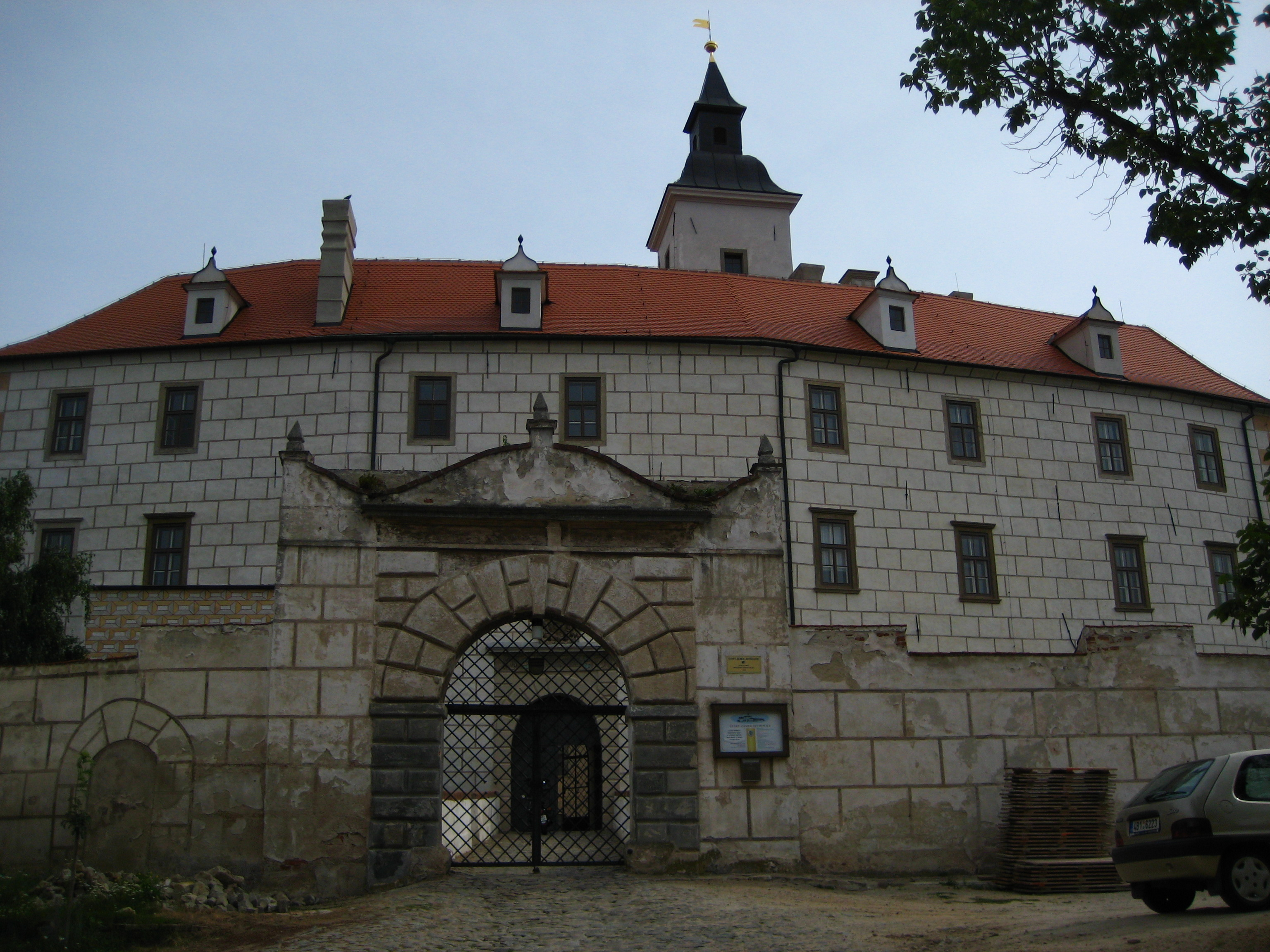 Zámek starý Jevišovice, v obci na ostrožně 1, Jevišovice